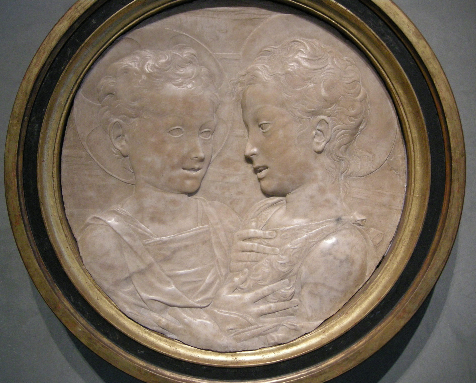 Desiderio da settignano, gesù e san giovannino.JPG